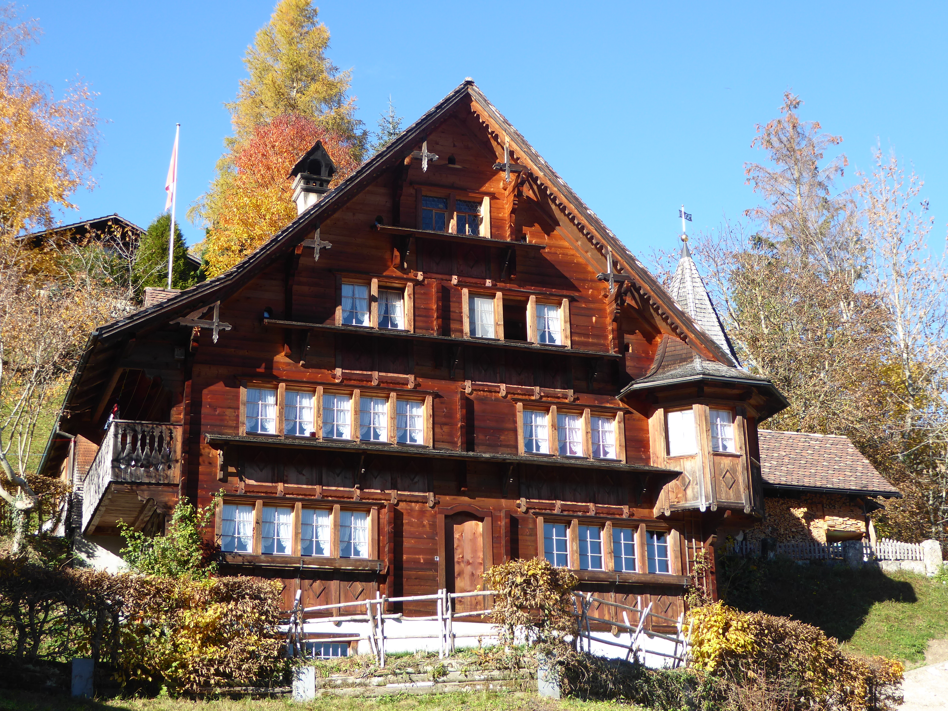 Türmlihaus im Dorf Libingen